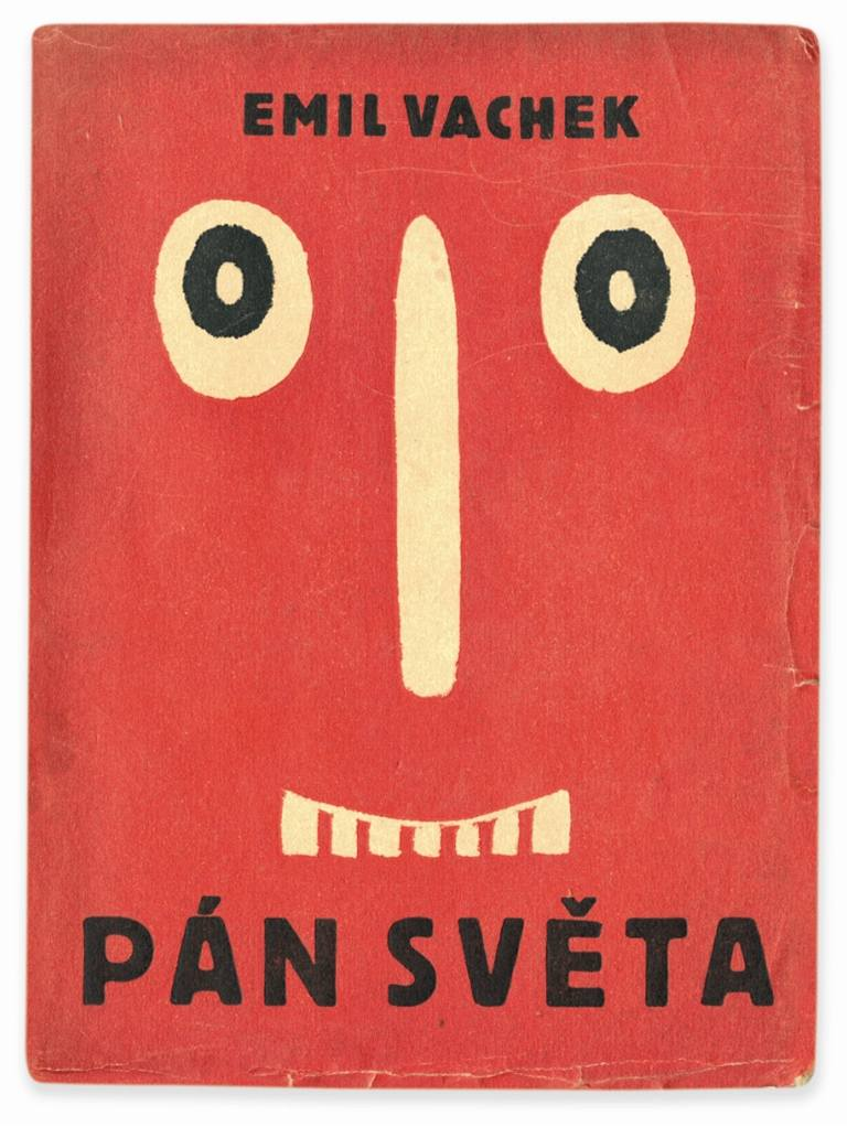 Tvorba Josefa Čapka